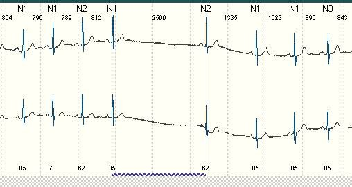 Ausschnitt eines Langzeit-EKG mit einem Sinusknotenstillstand oder kompletten SA-Block